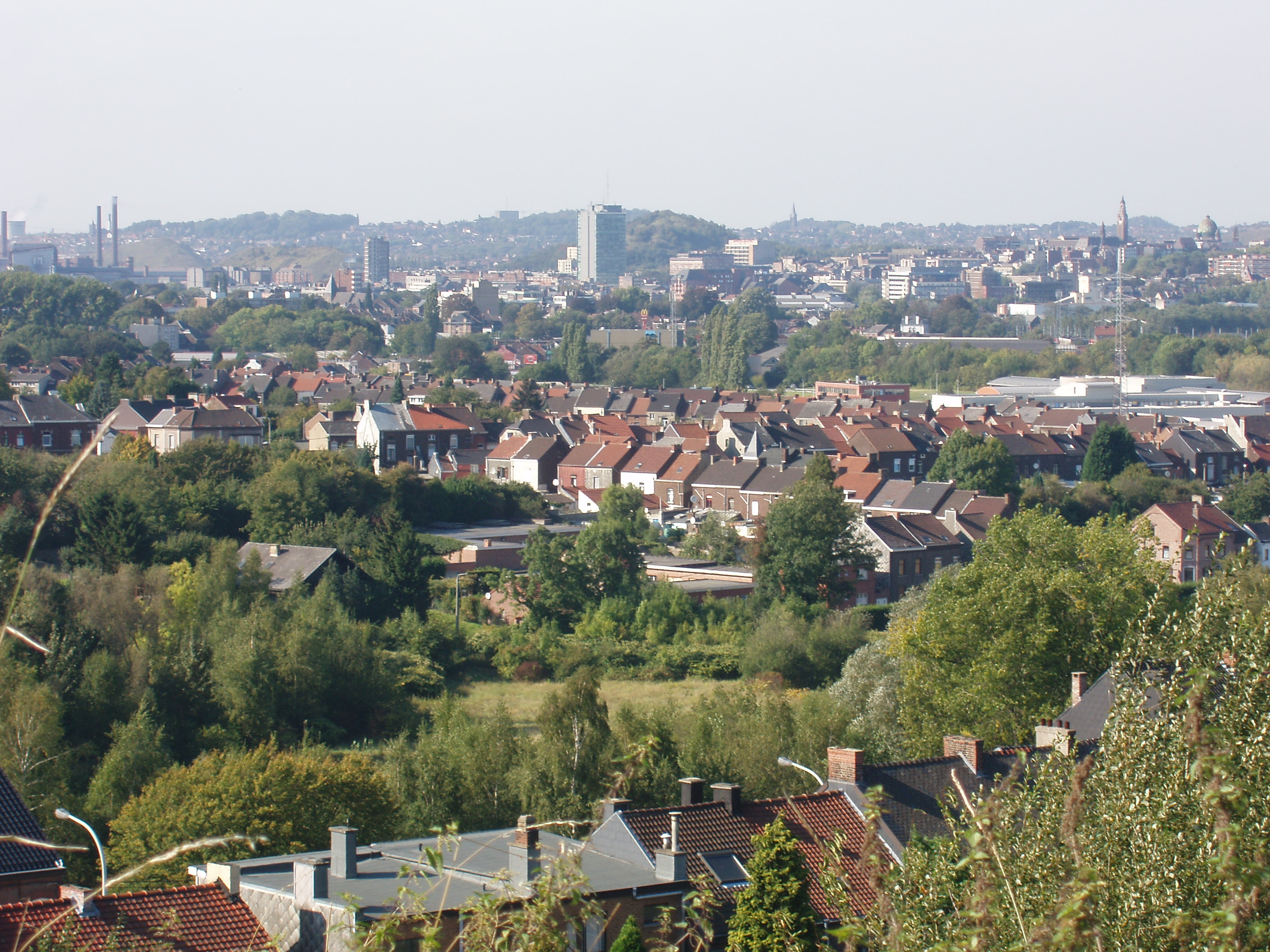 Blick auf Charleroi.